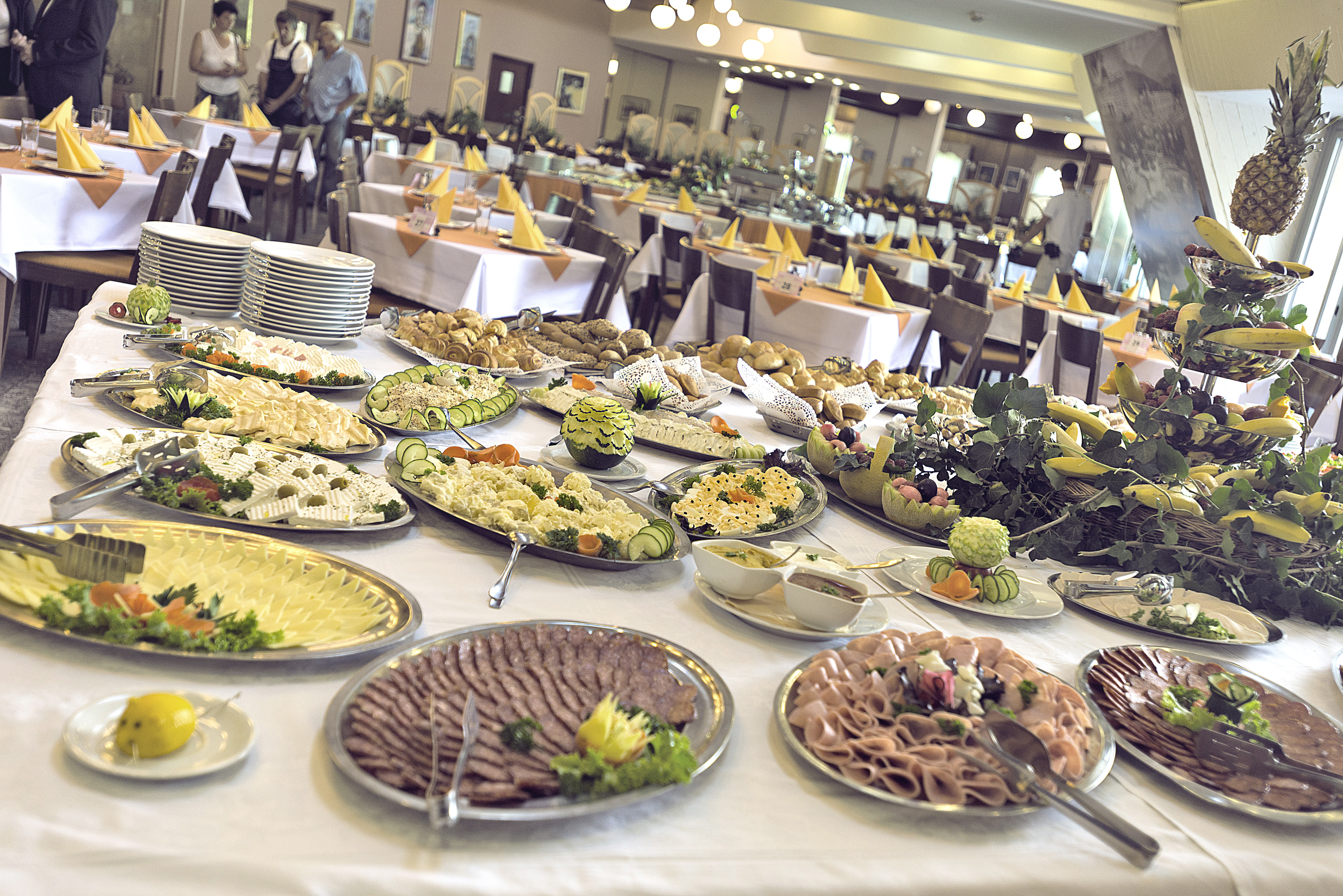 Izgled švedskog stola u objektu Merkur Novi.